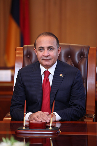 Հովիկ Աբրահամյան՝ ՀՀ Ազգային Ժողովի նախագահ (29 սեպտեմբերի 2008 թ. - 21 նոյեմբերի 2011 թ.)